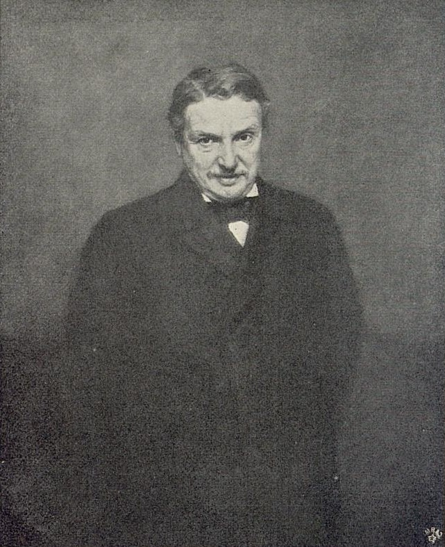 Max Koner: Portrait Konsul Hermann Wallich, 1898